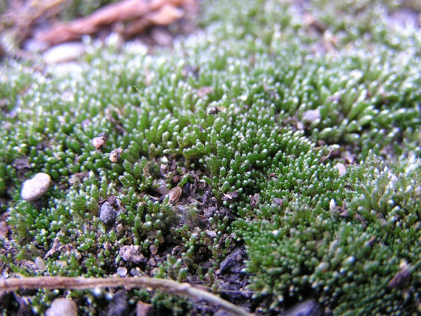 Silbermoos (Bryum argenteum) auf Asphalt im Bonner Stadtgebiet